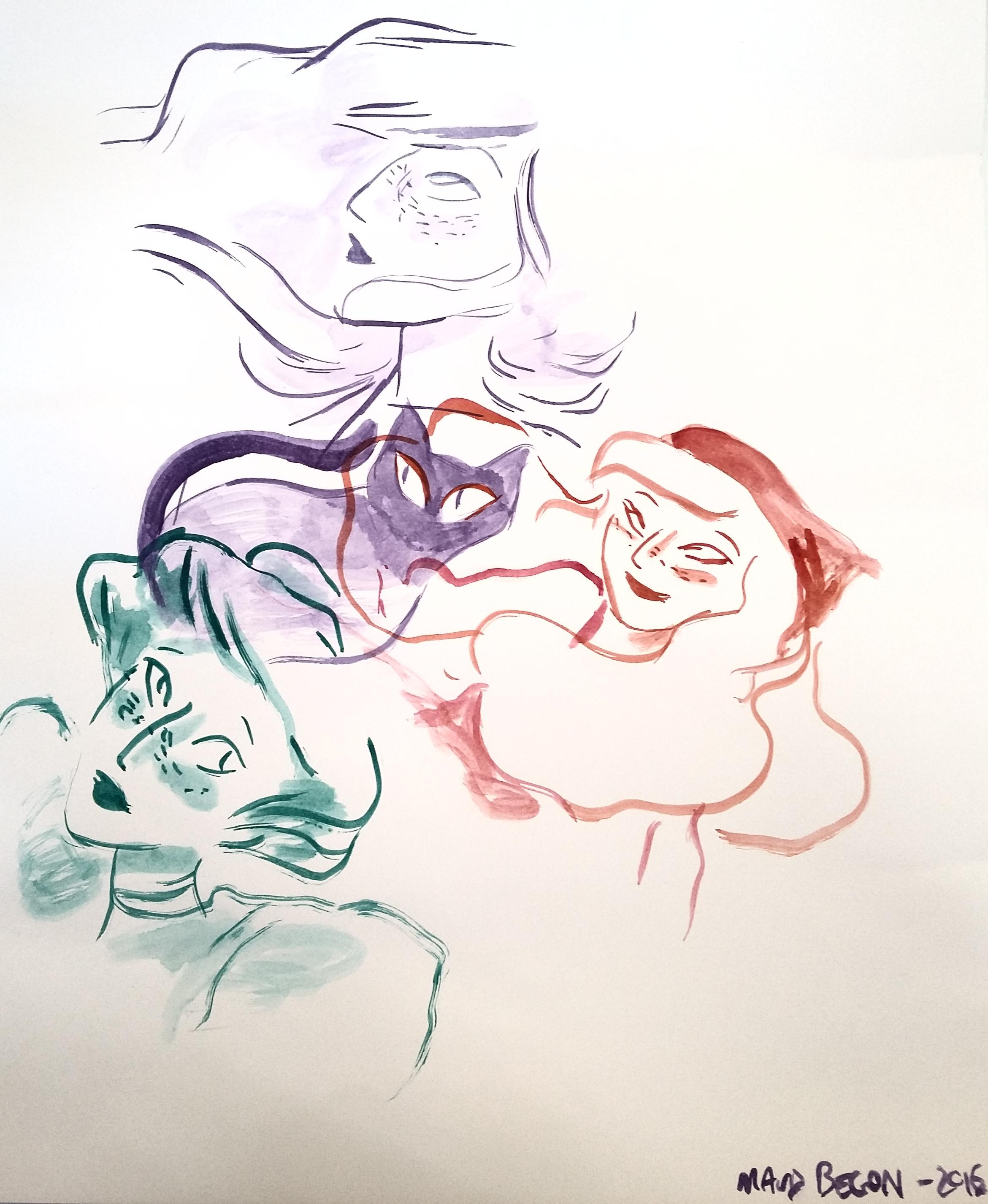 Dessin réalisé a la Médiathèque de Montargis lors d'une rencontre avec des élèves du lycée Durzy.